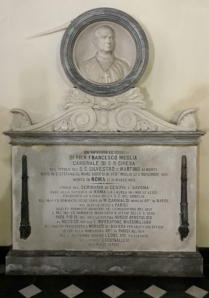 Lapide tombale del cardinale Pier Francesco Meglia conservata presso la chiesa di Santo Stefano al Mare.